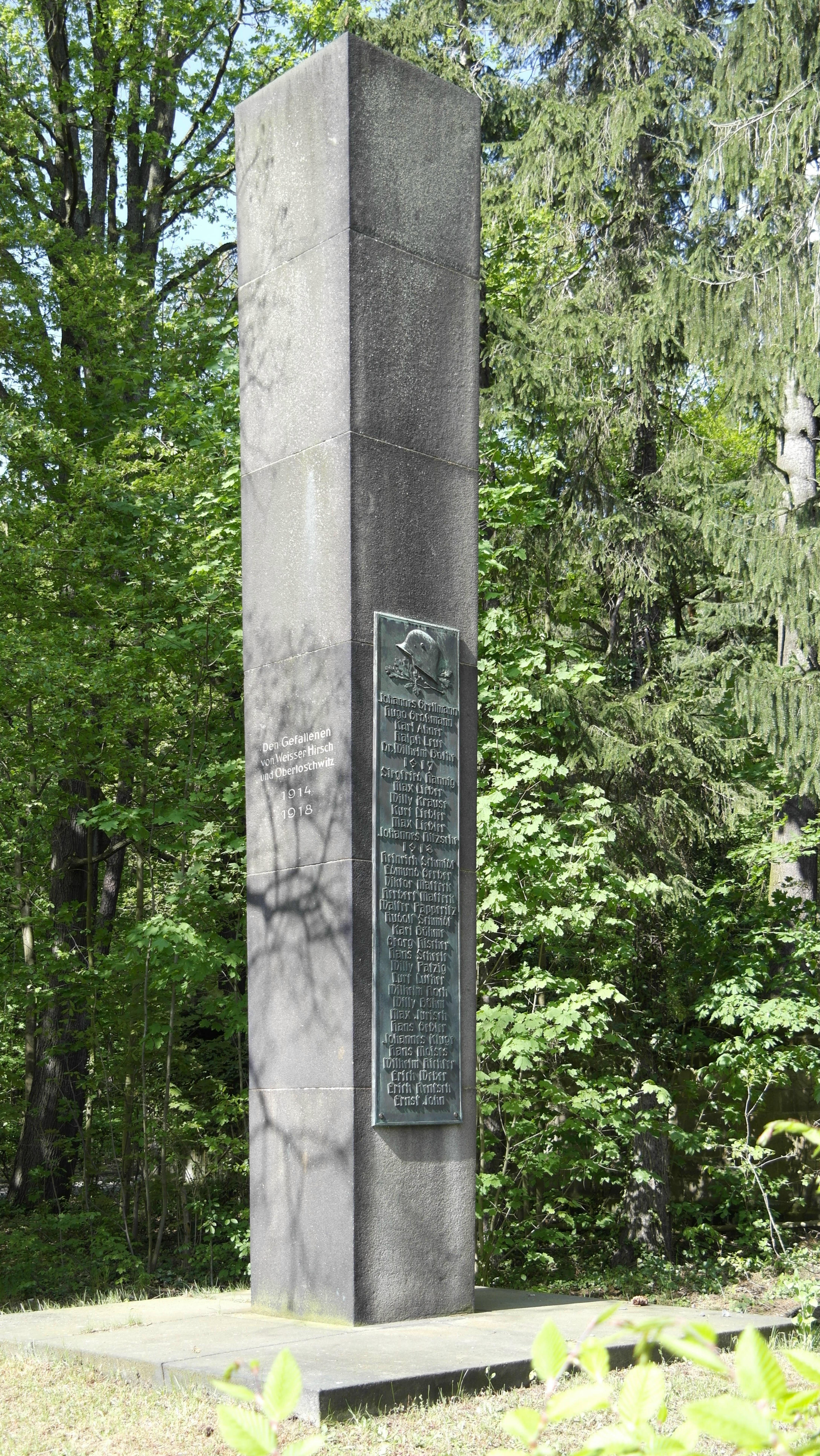 Dresden, Waldfriedhof Weißer Hirsch Ehrenmal für Gefallene des 1.Weltkrieges am Eingang zum Friedhof.